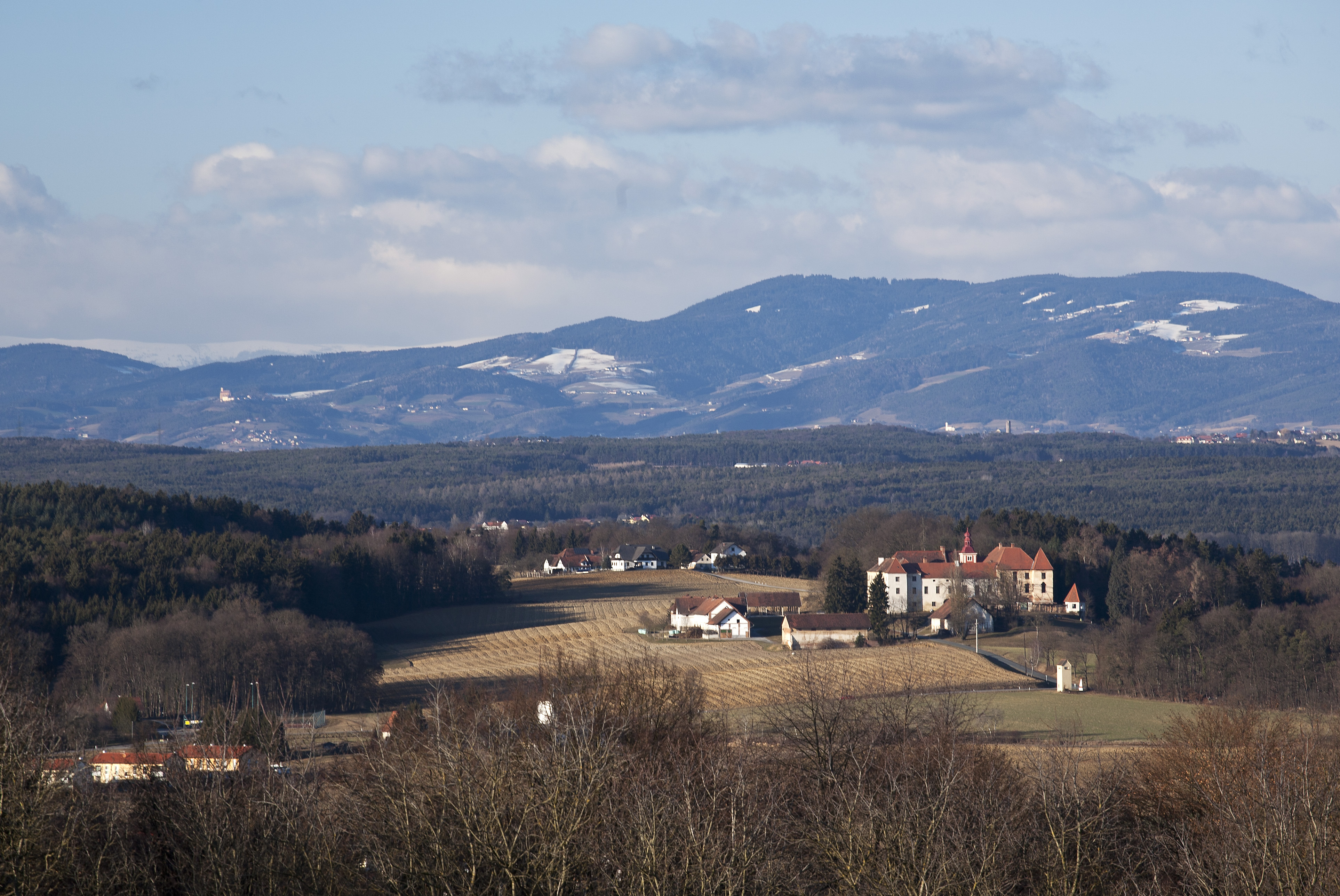 Schloss Kalsdorf bei Ilz mit Umland